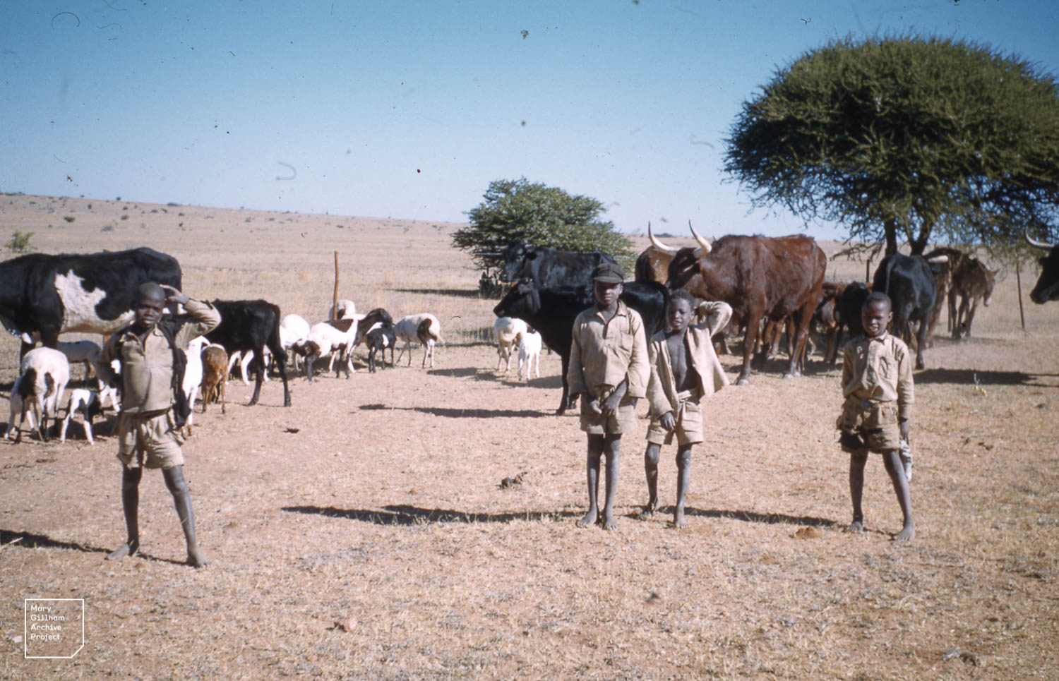 Drakensburg, Ebenezer